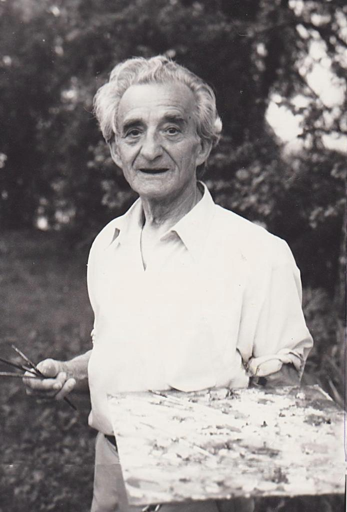 Porträt